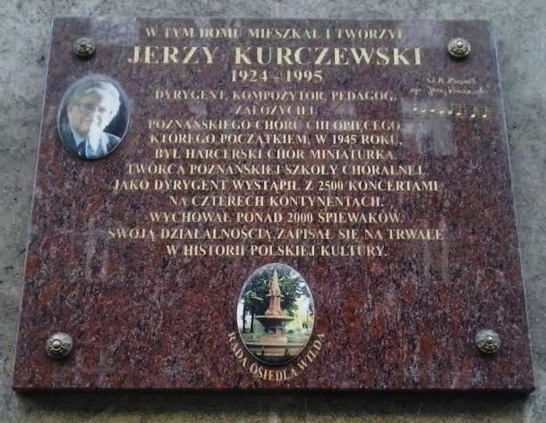 Tablica Jerzego Kurczewskiego na jego domu przy ul. Chwiałkowskiego w Poznaniu.